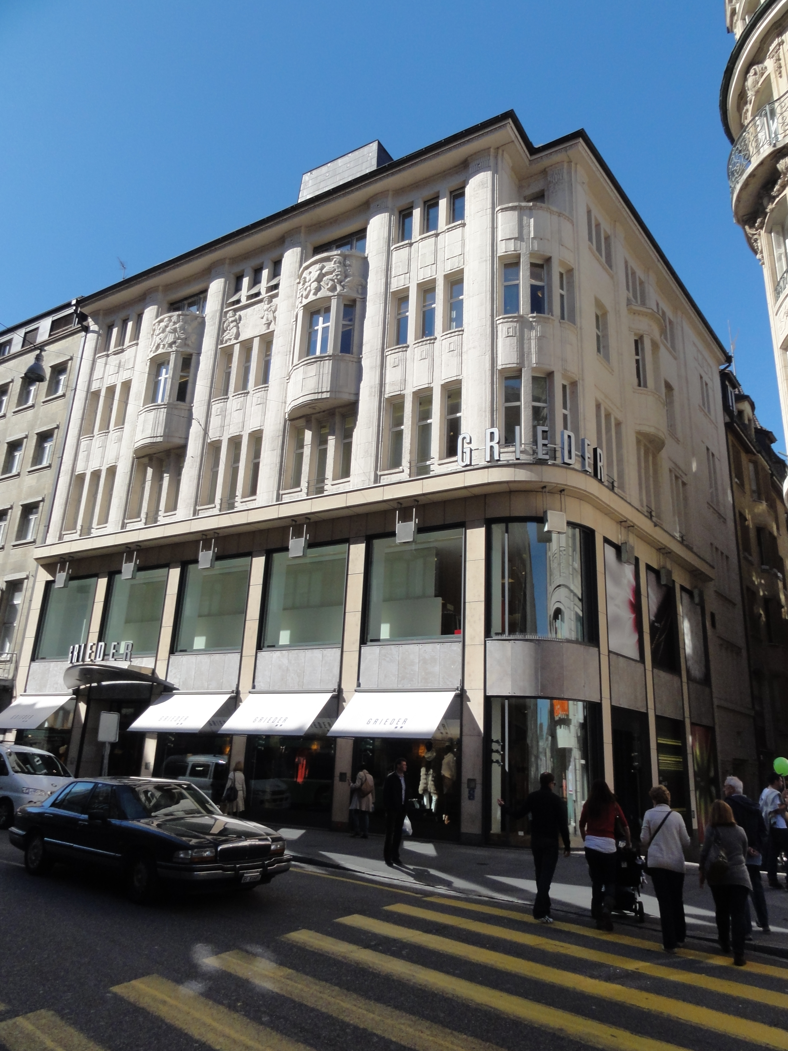 Basel, Eisengasse 14 — Bongénie Grieder